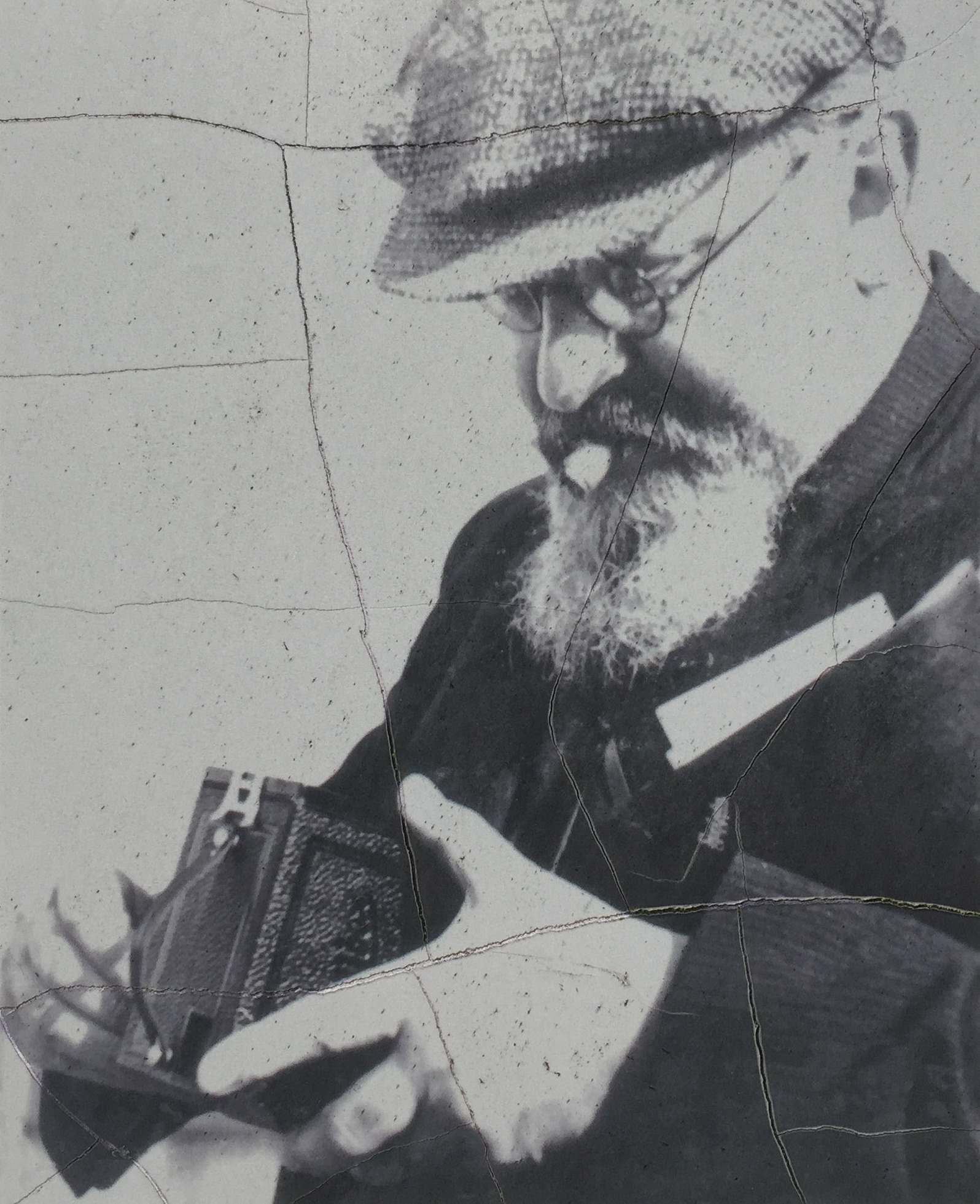 Joseph Carlebach (1883-1942), deutscher Rabbiner. Porträtfoto auf einer dauerhaft öffentlich aufgestellten Gedenktafel für die Rabbinerfamilie Calebach im Carlebach-Park des Hochschulstadtteils in Lübeck